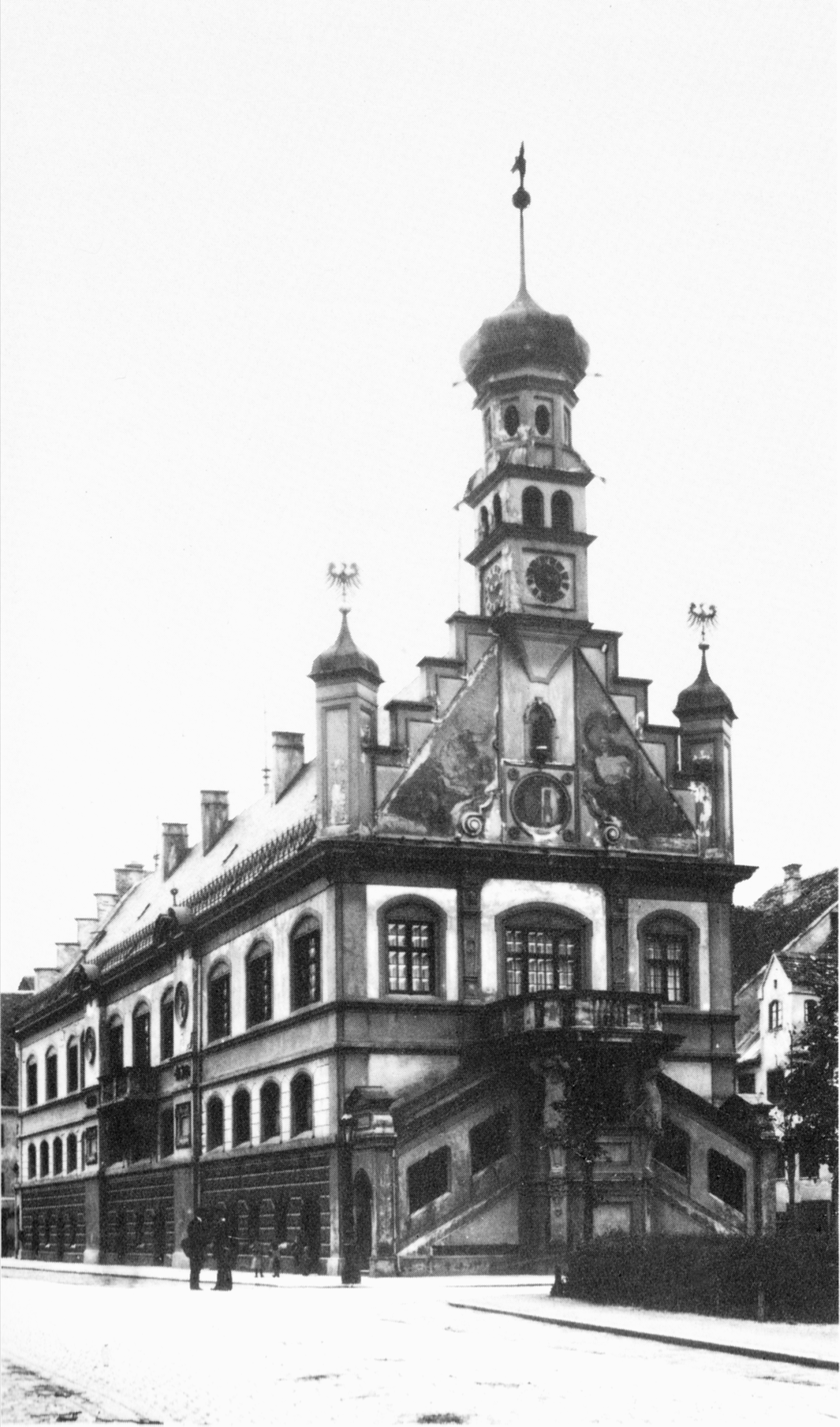 Das Rathaus in Kempten zwischen 1878 und 1897. Ostansicht nach der Umgestaltung durch Ludwig von Kramer.